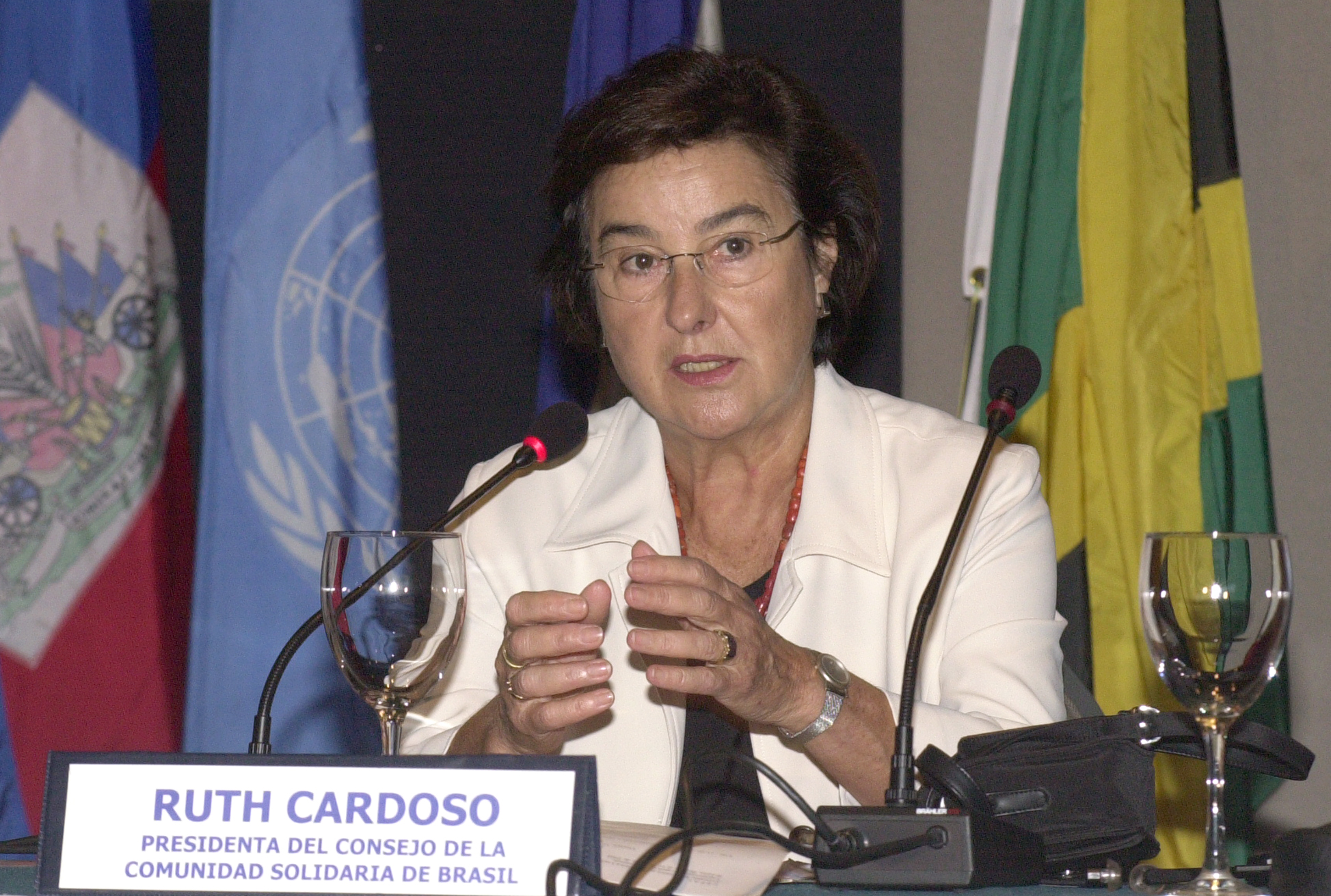 A antropóloga Ruth Cardoso, em evento à época em que presidia o projeto Comunidade Solidária, de combate à exclusão social e à pobreza, durante o mandato do marido Fernando Henrique Cardoso como presidente da República.